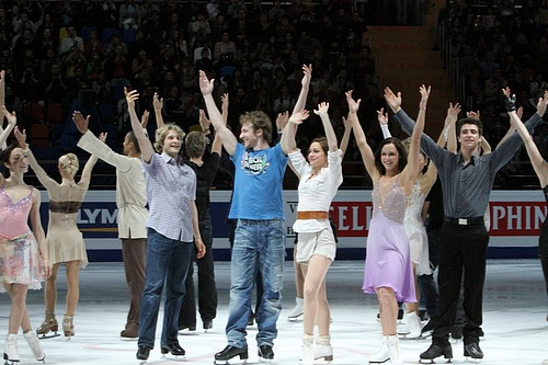 Финал показательных выступлений фигуристов на чемпионате мира 2011 года